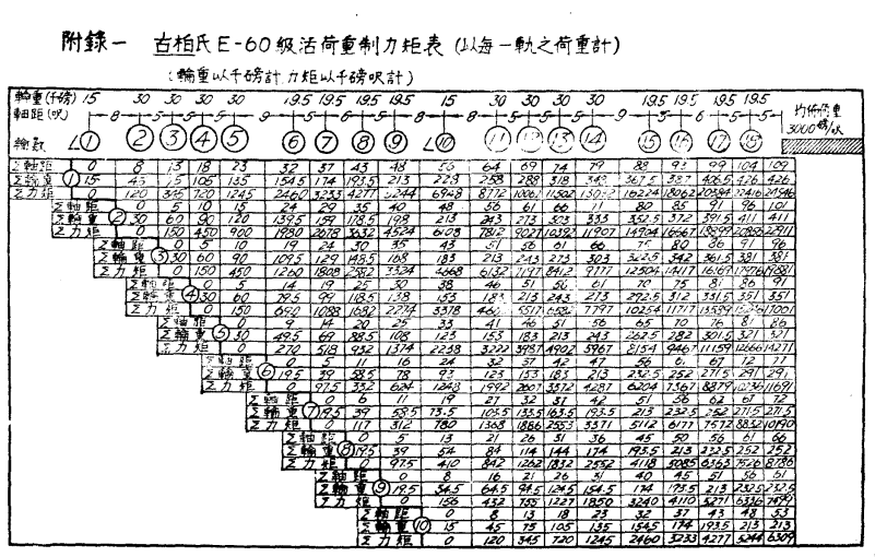 Coopers Loading System E-60 古柏氏载重标准 E-60级活荷重制力矩表 普通结构学 中 作 者 ：蔡方荫著 （1901-1963） 出版发行 : 商务印书馆 , 1946.08 ISBN号 ：68324·1B PAGE 265